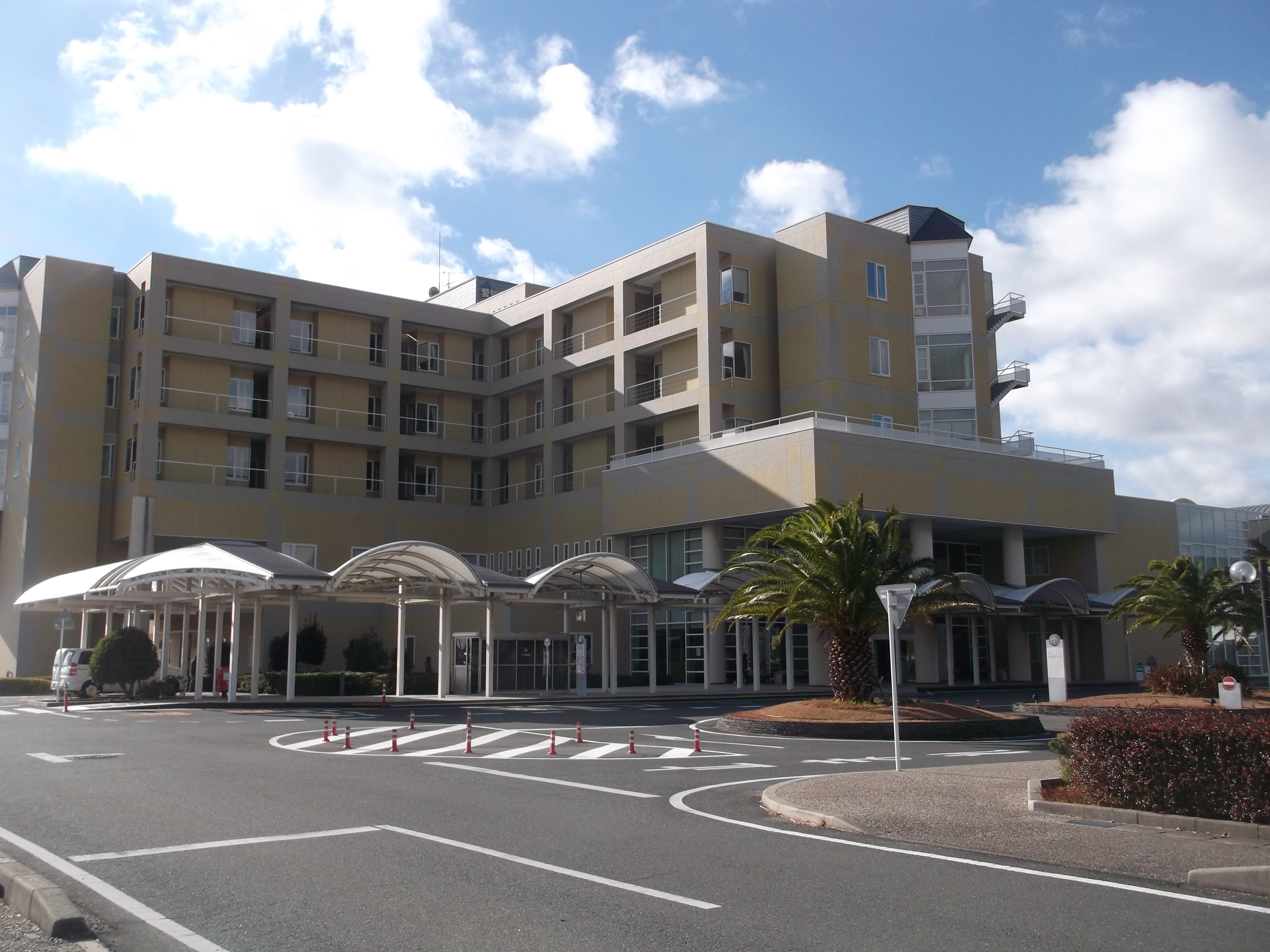 愛知県厚生農業協同組合連合会 渥美病院